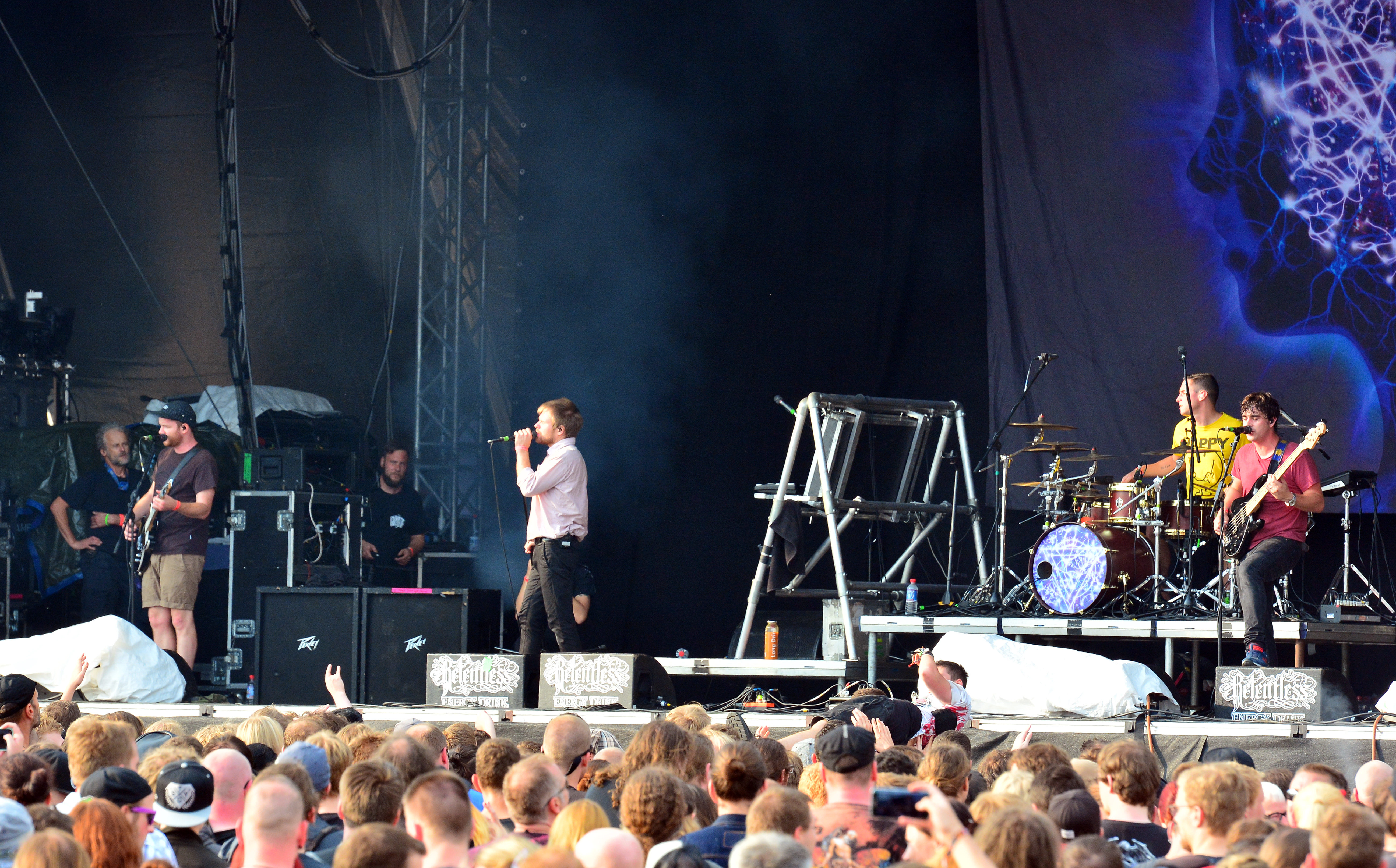 Enter Shikari beim Elbriot 2015